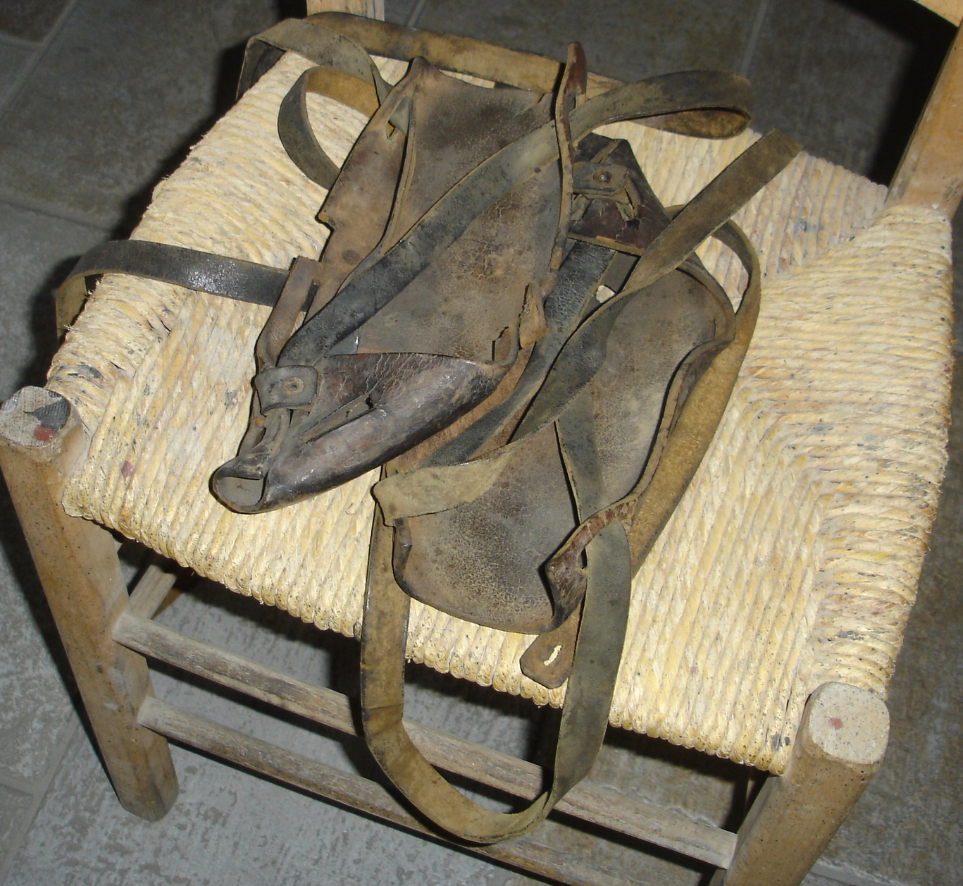 Le ciocie come apparivano con disincanto rustico.